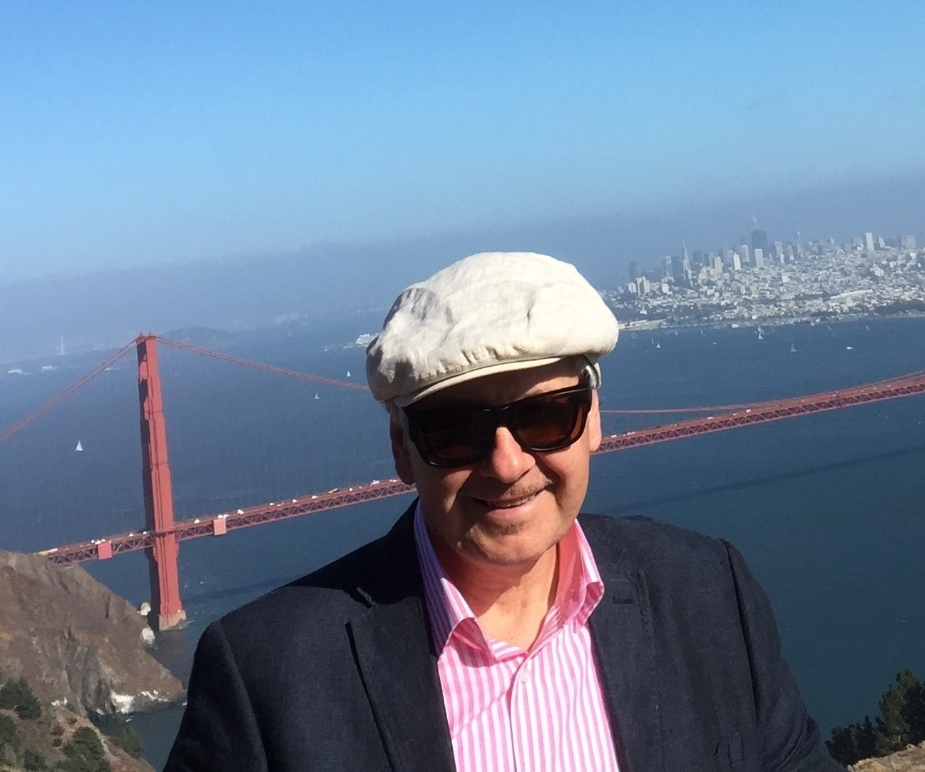 Bernward Koch, San Francisco Headlands 14. September 2017, Foto: Hannah Koch